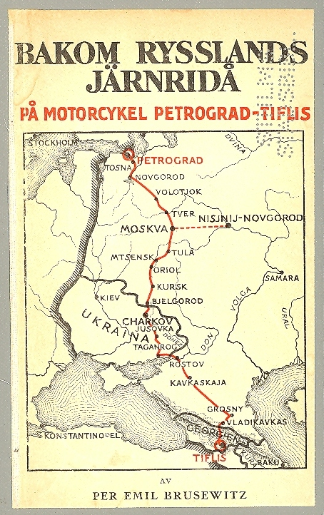 Pärmframsida från boken "Bakom Rysslands järnridå", tryckt i Stockholm 1923.